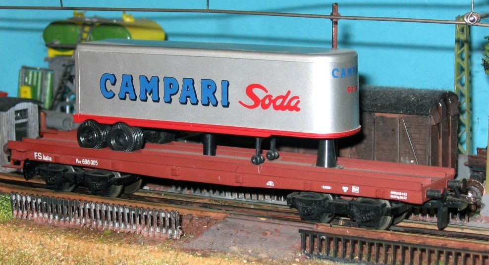 Campari-Aufleger, Wagon Modell der Firma Rivarossi hergestellt für die Firma Trix